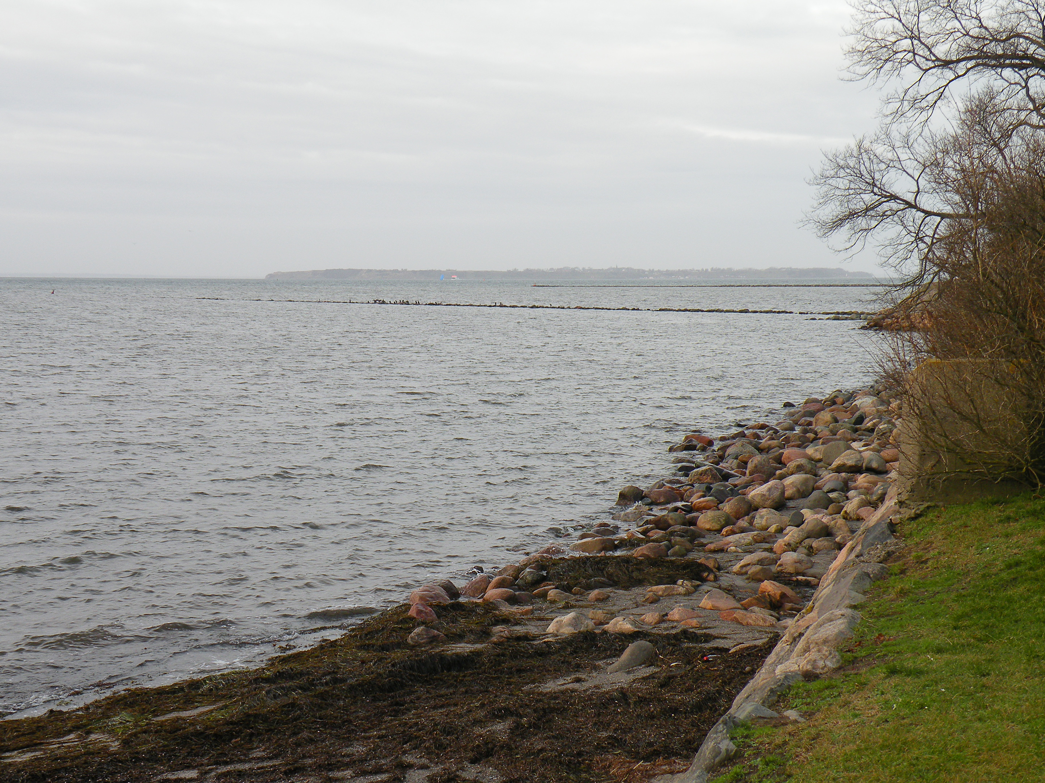 Остров Вэн.Вид от Ландскроны.